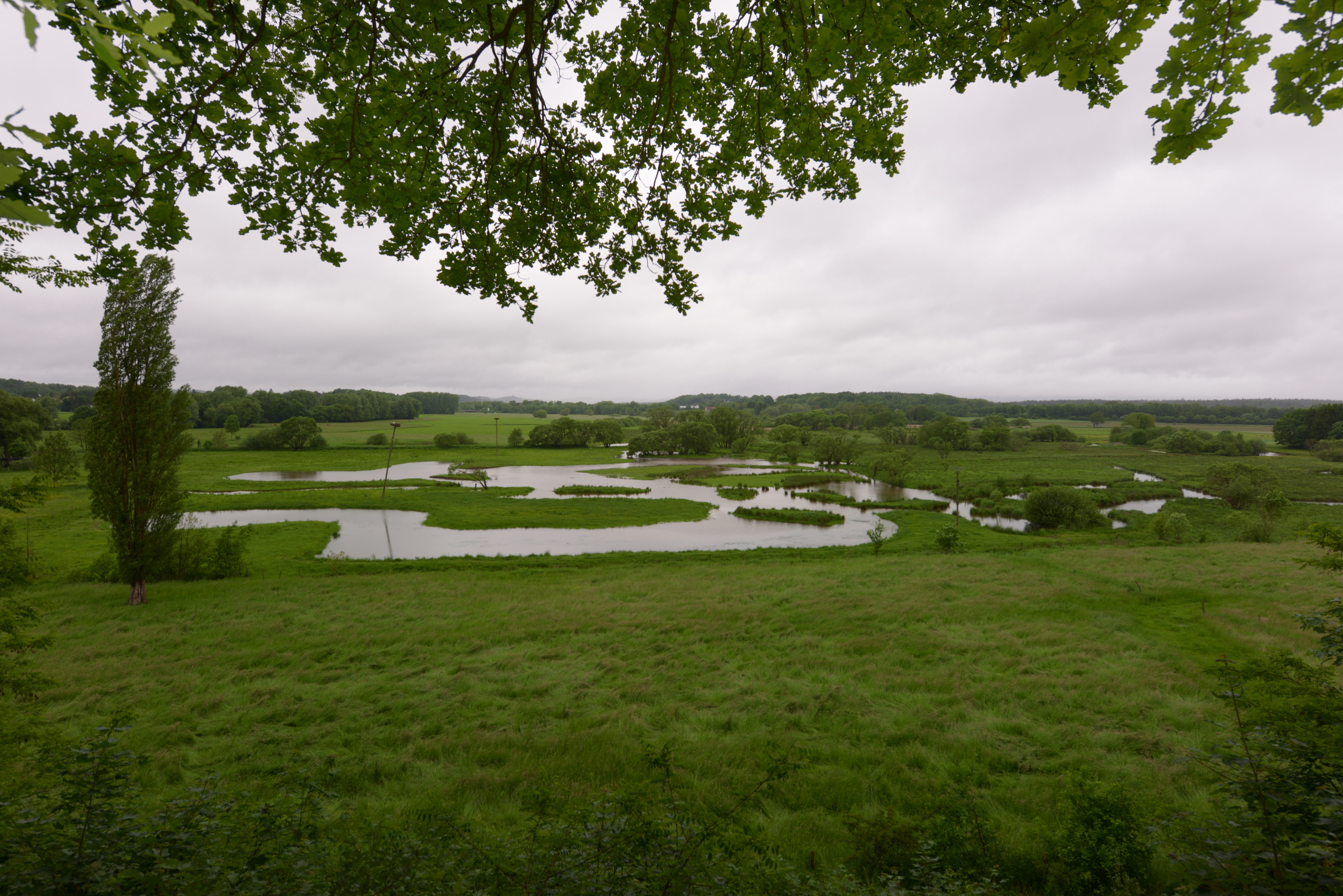 EU-Vogelschutzgebiet Nr. 6609-308 Beedener Bruch in Beeden (Stadtteil von Homburg/Saar). Weiträumige Wiesenlandschaft mit hohem Feuchtwiesenanteil und offenen Wasserflächen. Größe: 130ha. Teil des Biosphärenreservats Bliesgau.